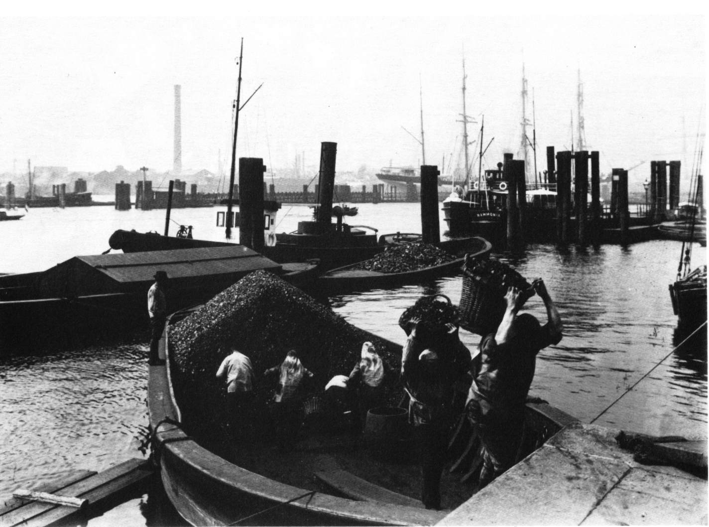 Schauerleute löschen mit Körben Nusskohlen aus einer Schute